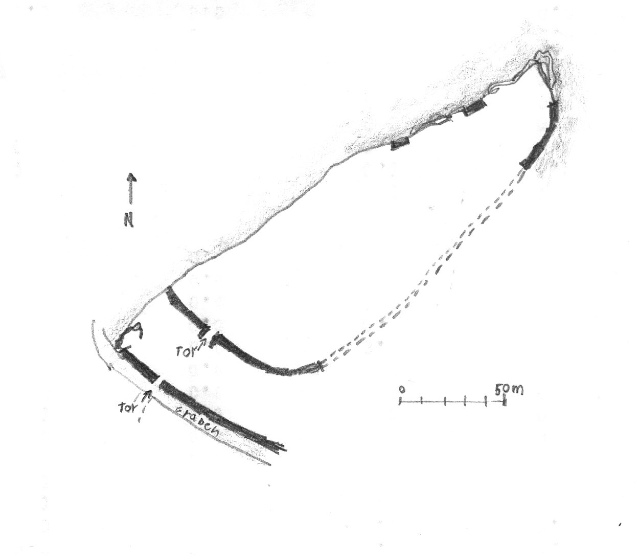 Heidenschuh, Grundriss-Skizze